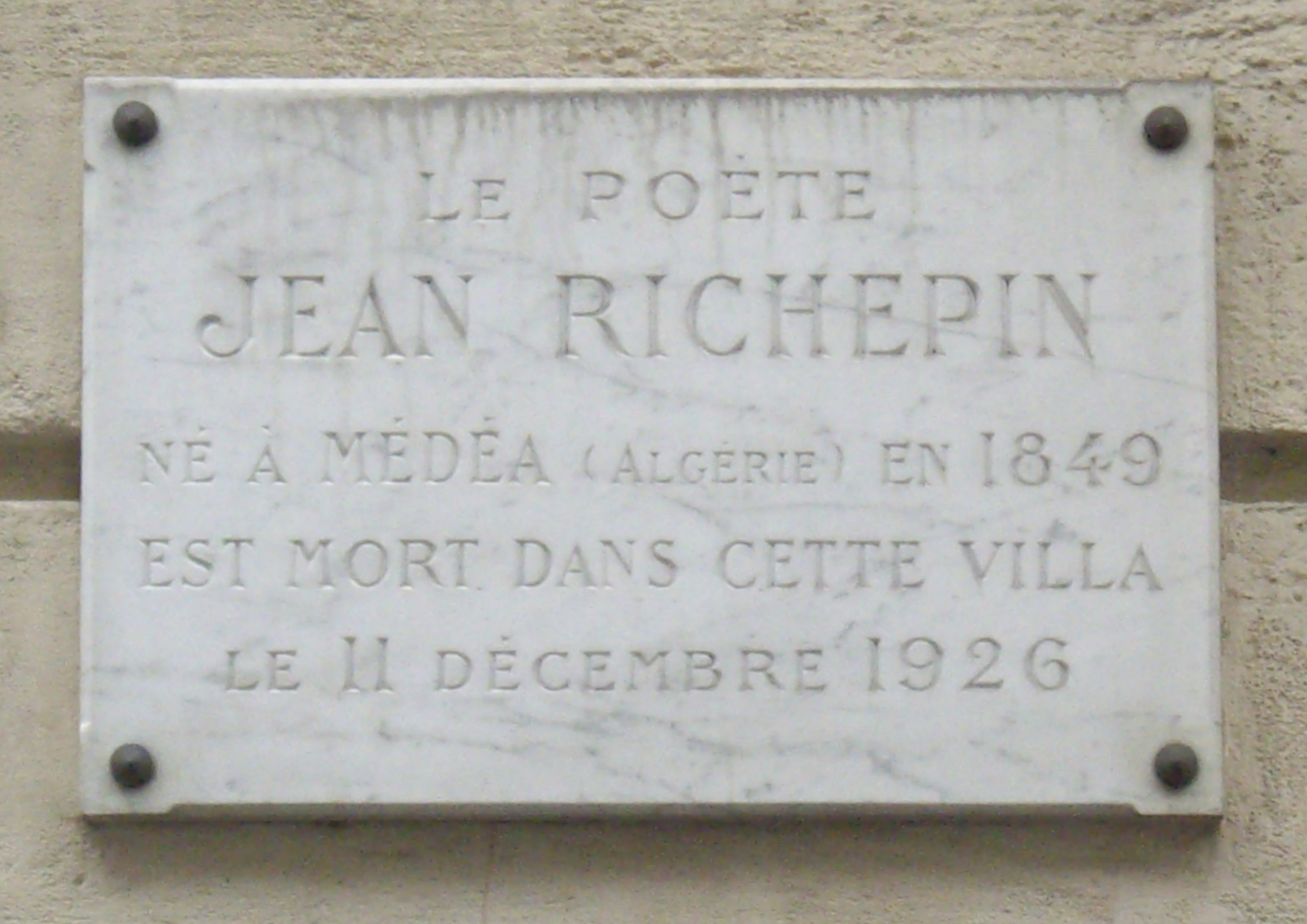 Plaque apposée au n° 85 de la rue de la Tour, Paris 16e, à l'angle de la villa Guibert, sur la demeure du poète Jean Richepin (1849-1926), où il est mort le 11 décembre 1926.